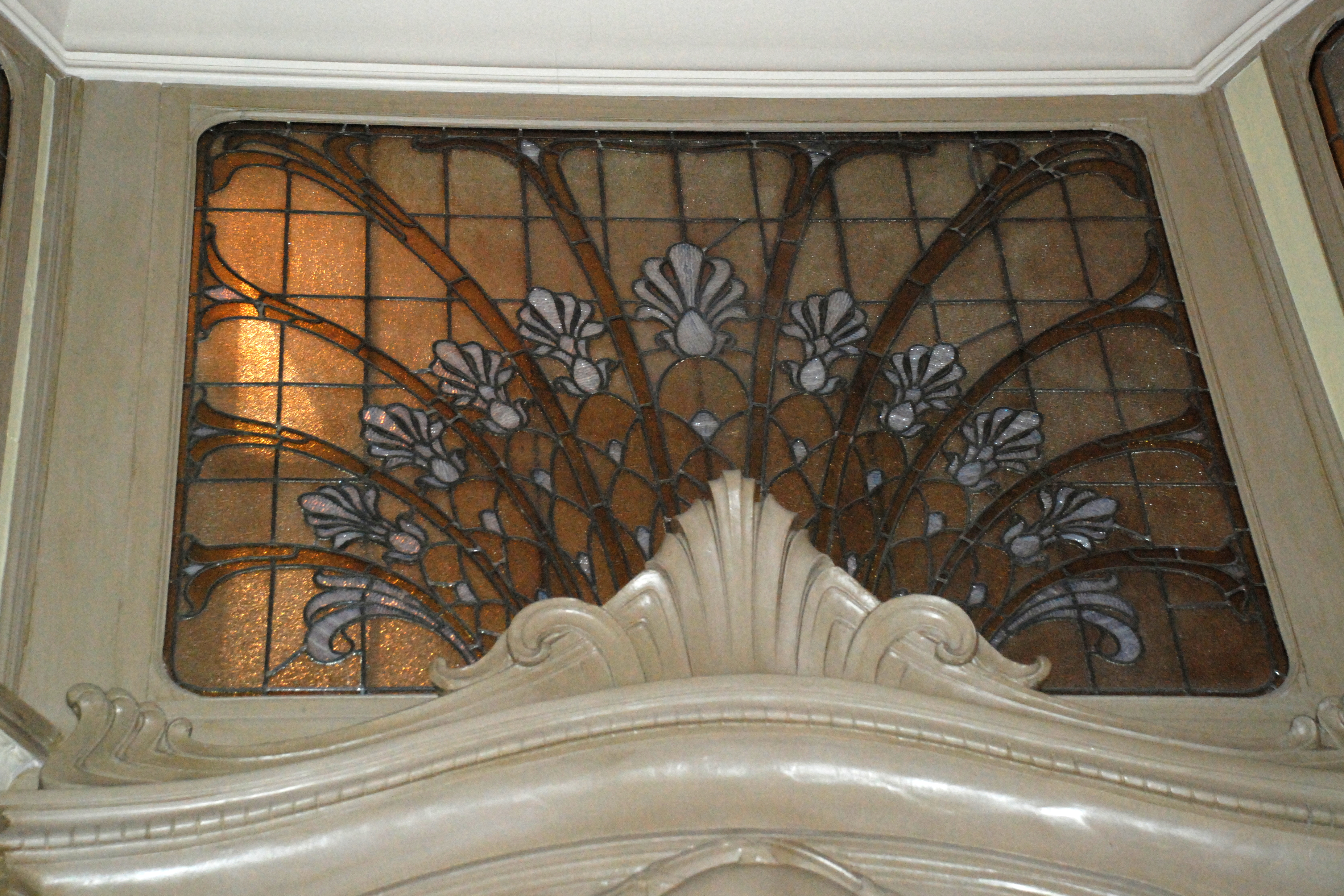 Belgique - Bruxelles - Hôtel Gresham